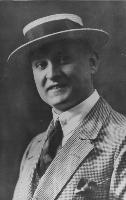 "Estonia" teatri näitleja Paul Pinna